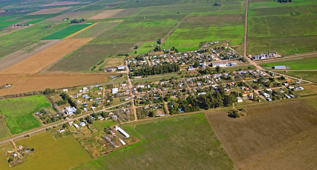 Imagen aérea Aldao (2010)